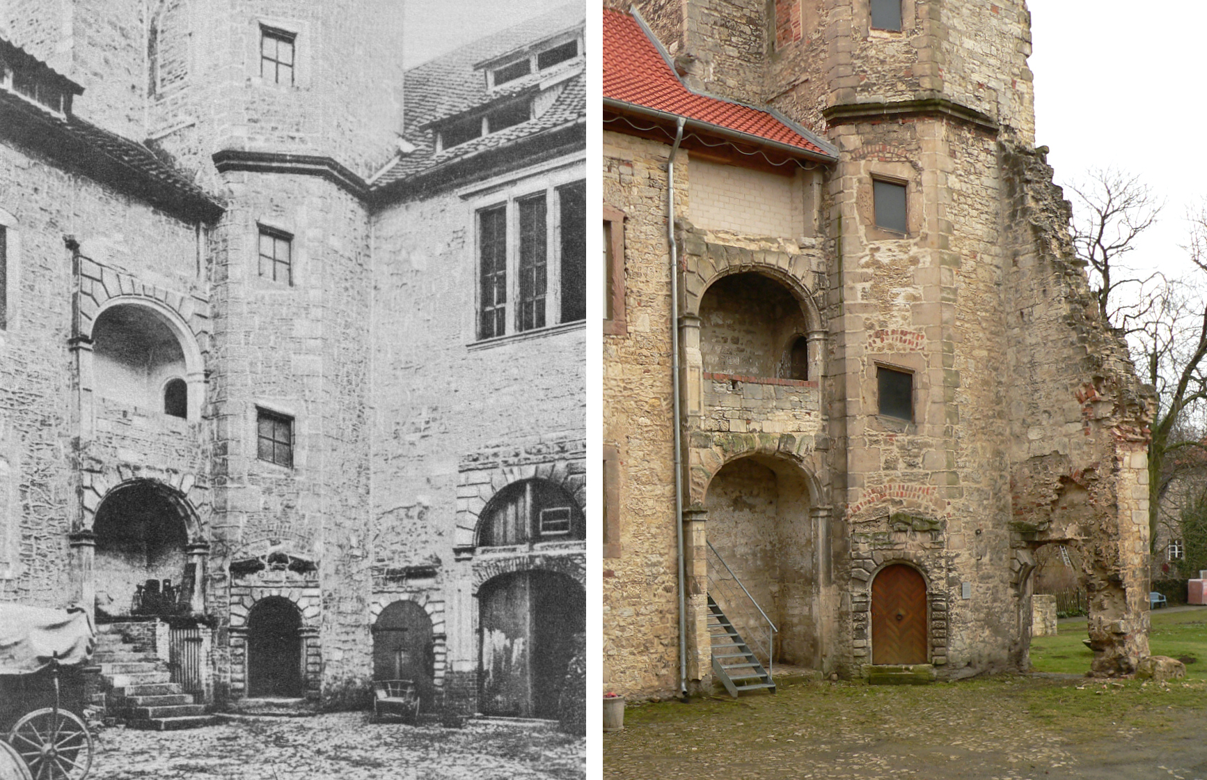 Schloss Hessen, Treppenturm 1906 und 2012, Aufnahme um 1900 Gemeinfrei